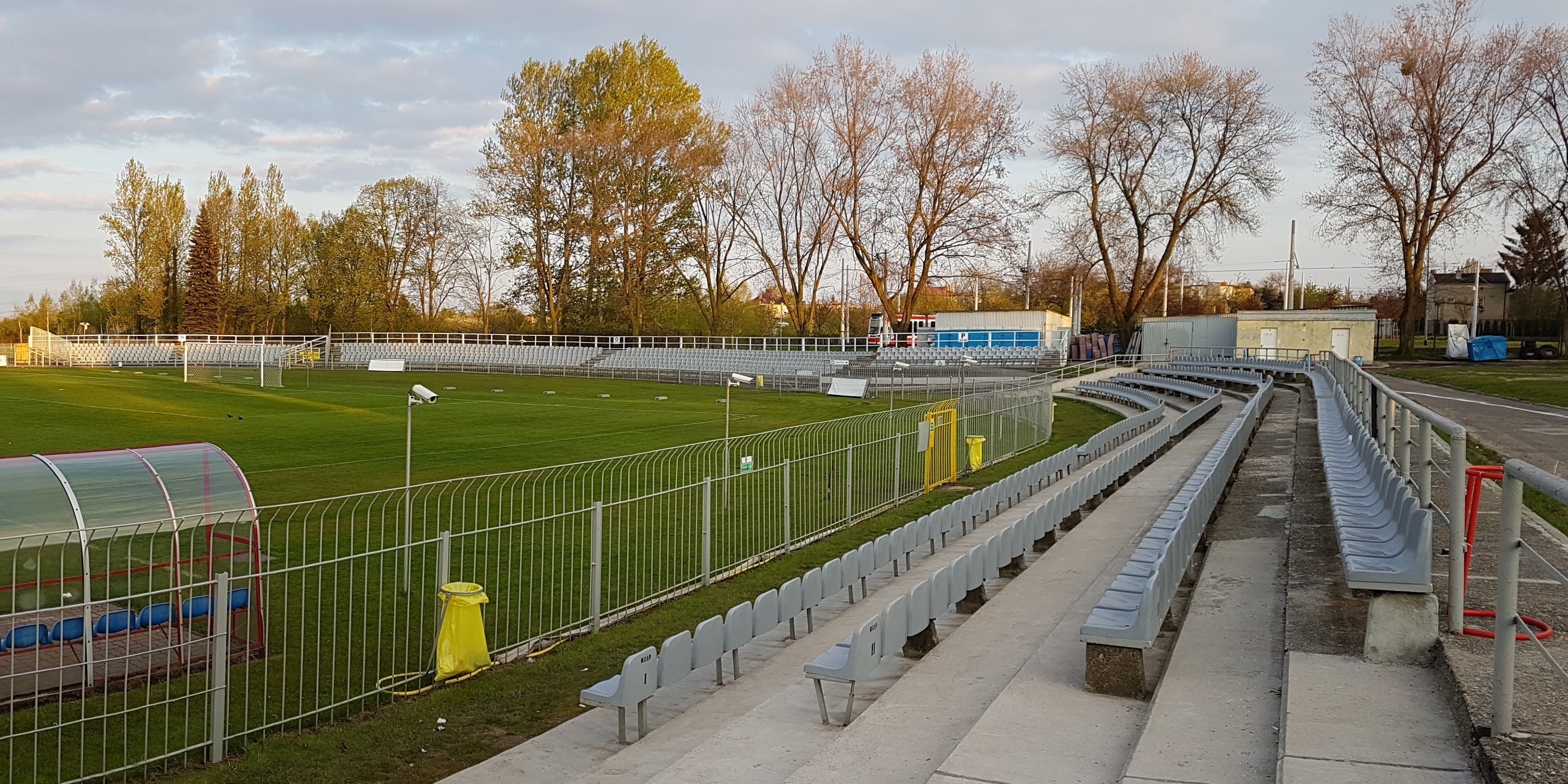 Miejski Stadion Piłkarski Raków - strona południowa